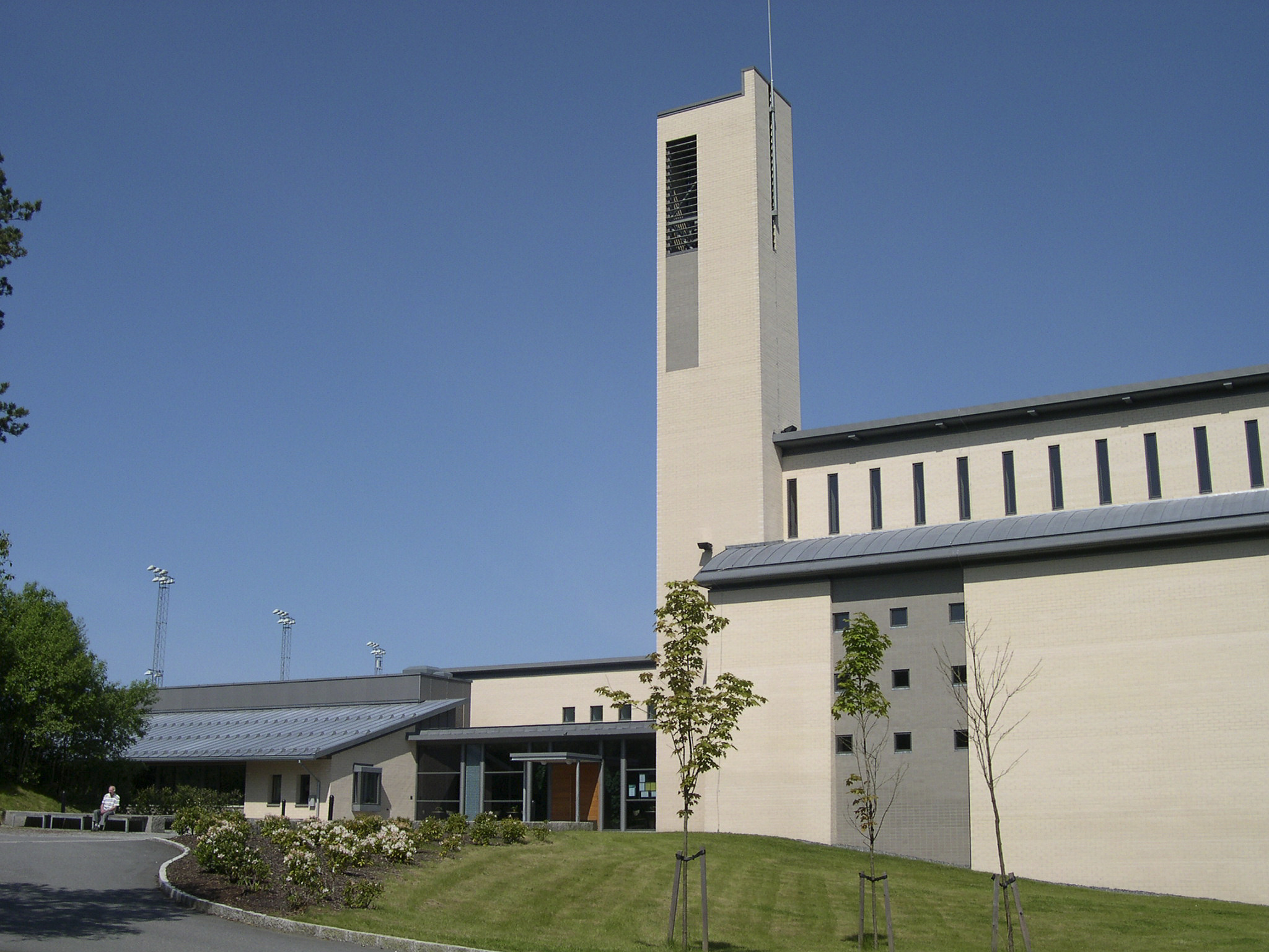 Sælen kirke, Fyllingsdalen. Foto: Oddbjørn Sørmoen, fra Kulturminnebilder.no.